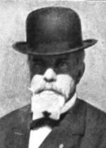 politico italiano